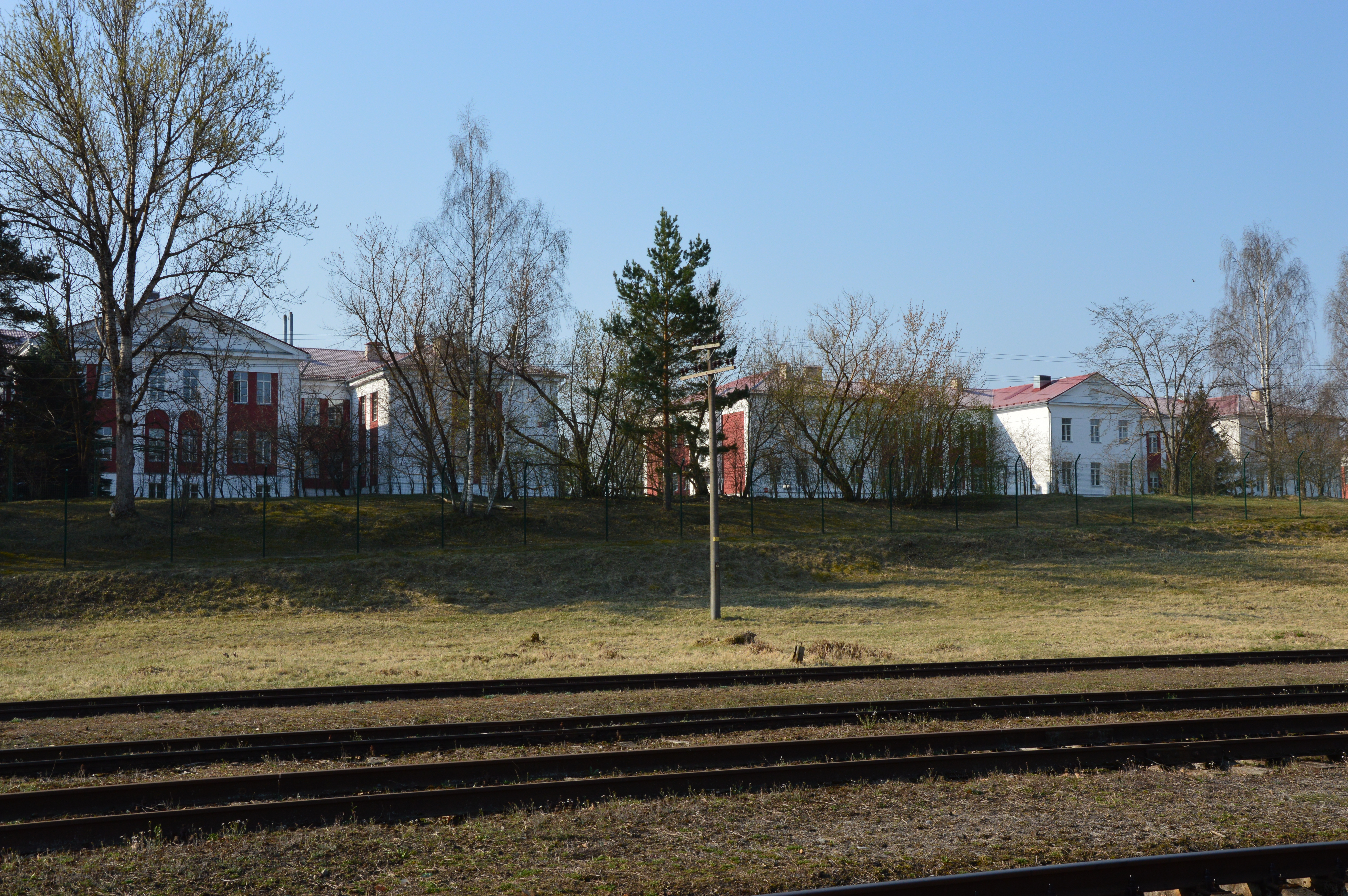 Kuperjanovi jalaväepataljoni hooned Valga–Petseri raudteelõigu ääres.